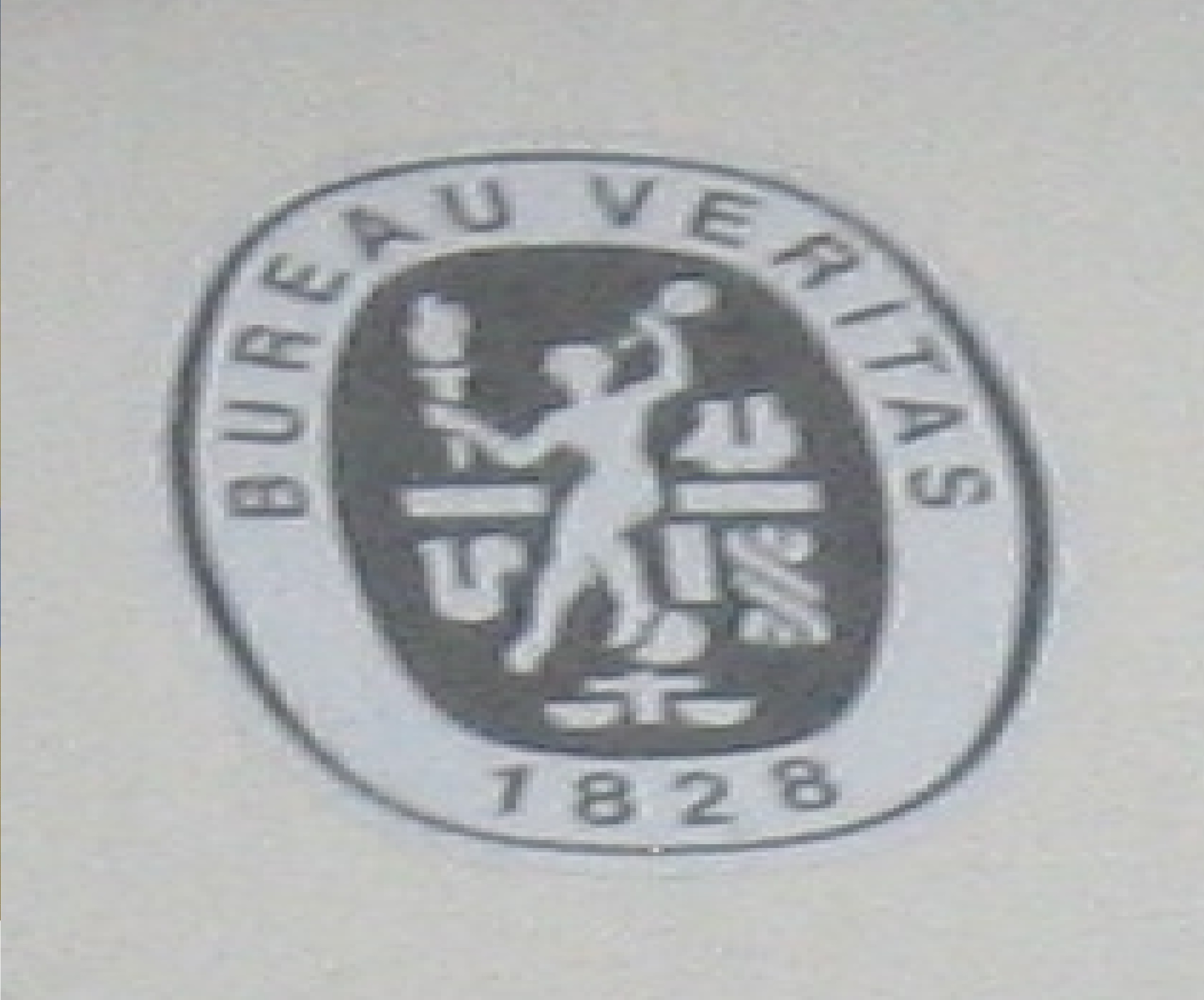 関連資料画像。